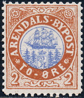 Почтовая марка городской почты Арендаля (Норвегия), 19 век